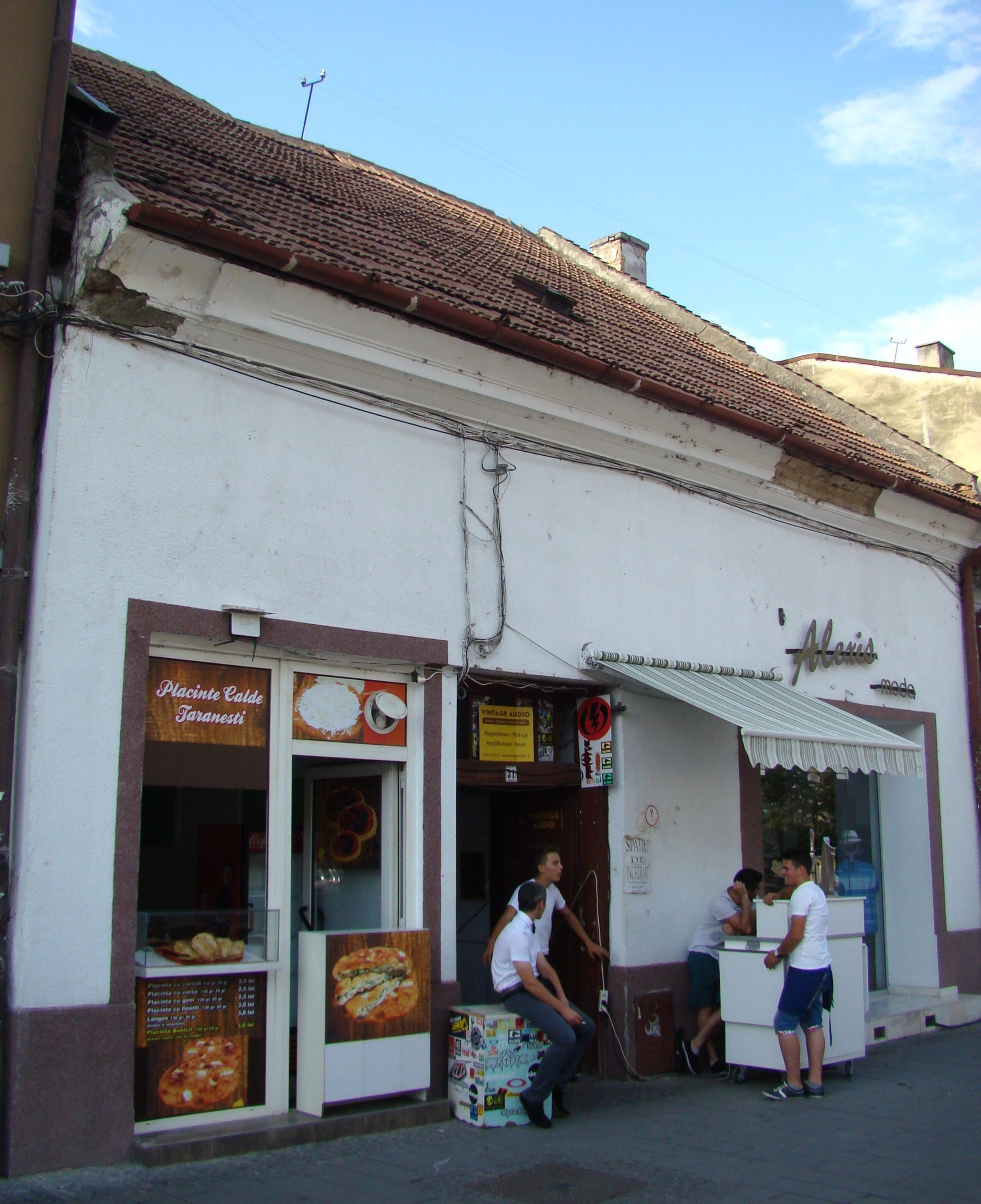 Clădire monument istoric, Bd.Eroilor, nr.31